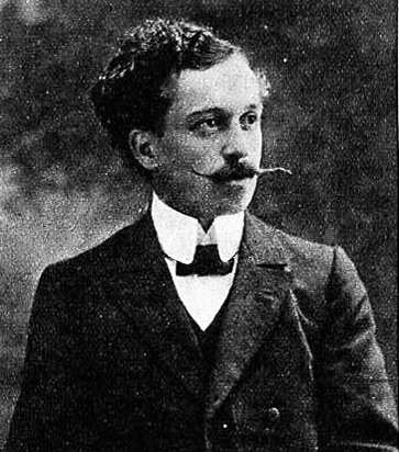 De Mathias Tresch, Foto vun 1909.